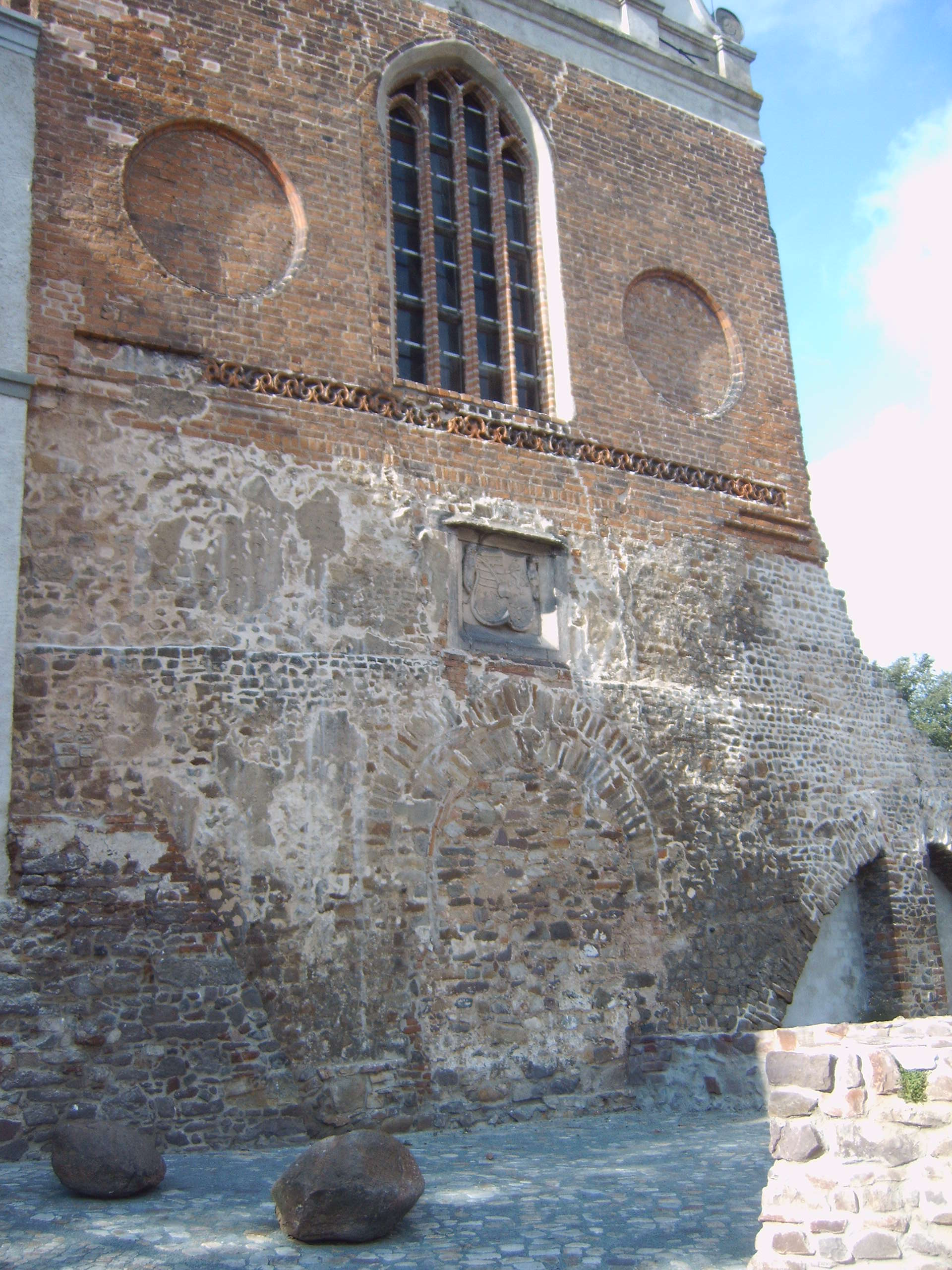 Ostfassade der Schlosskapelle, Schloss Wolmirstedt